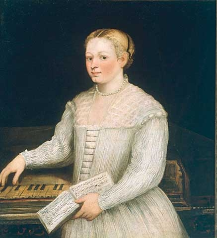 Autoritratto dela tintoretta alla spinetta